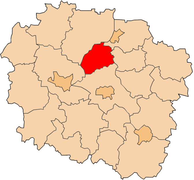 Powiat chełmiński na mapie województwa kujawsko-pomorskiego.